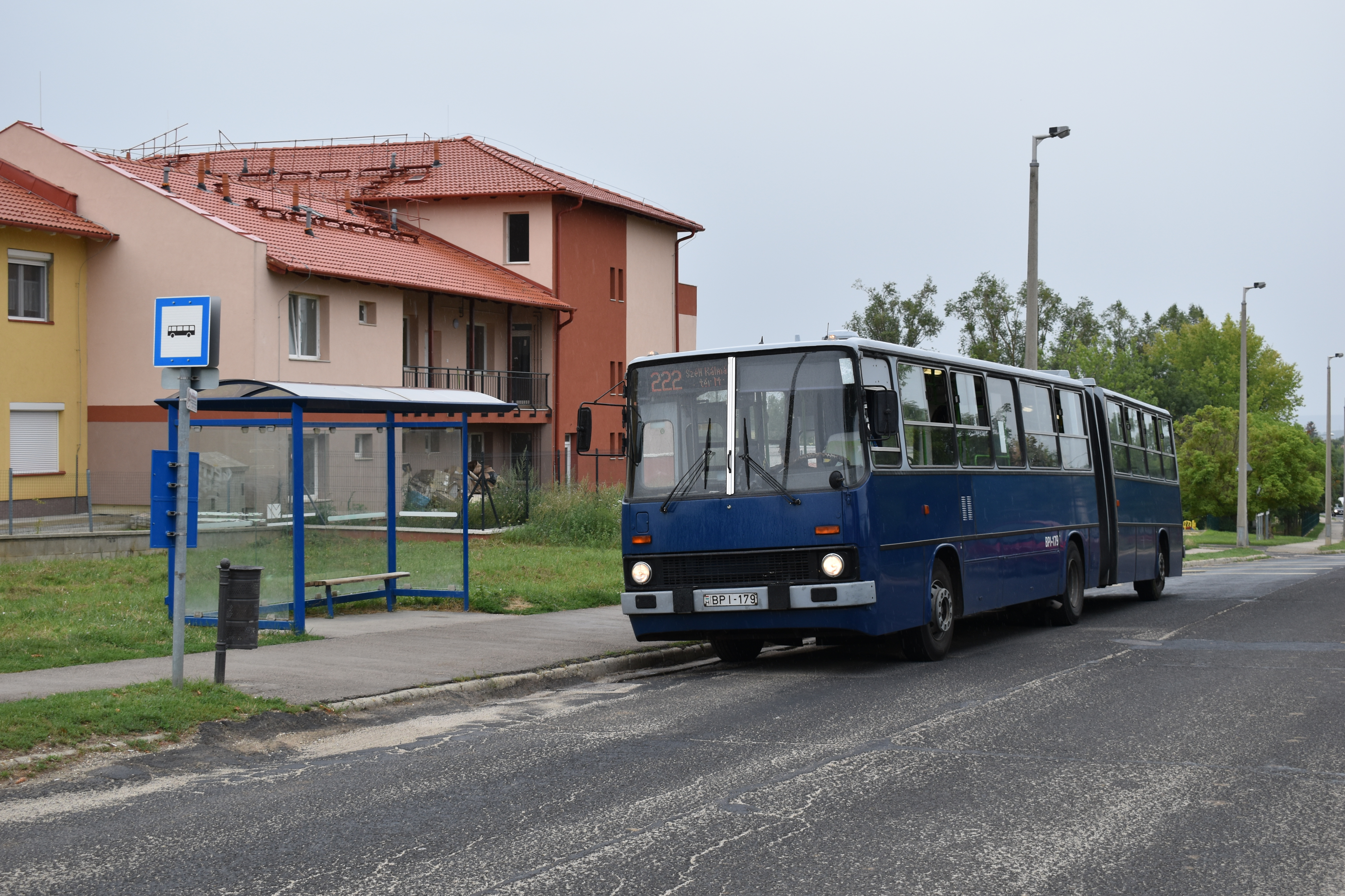 Honfoglalás sétány Ikarus 280-as autóbusszal 2019. augusztus 2-án.